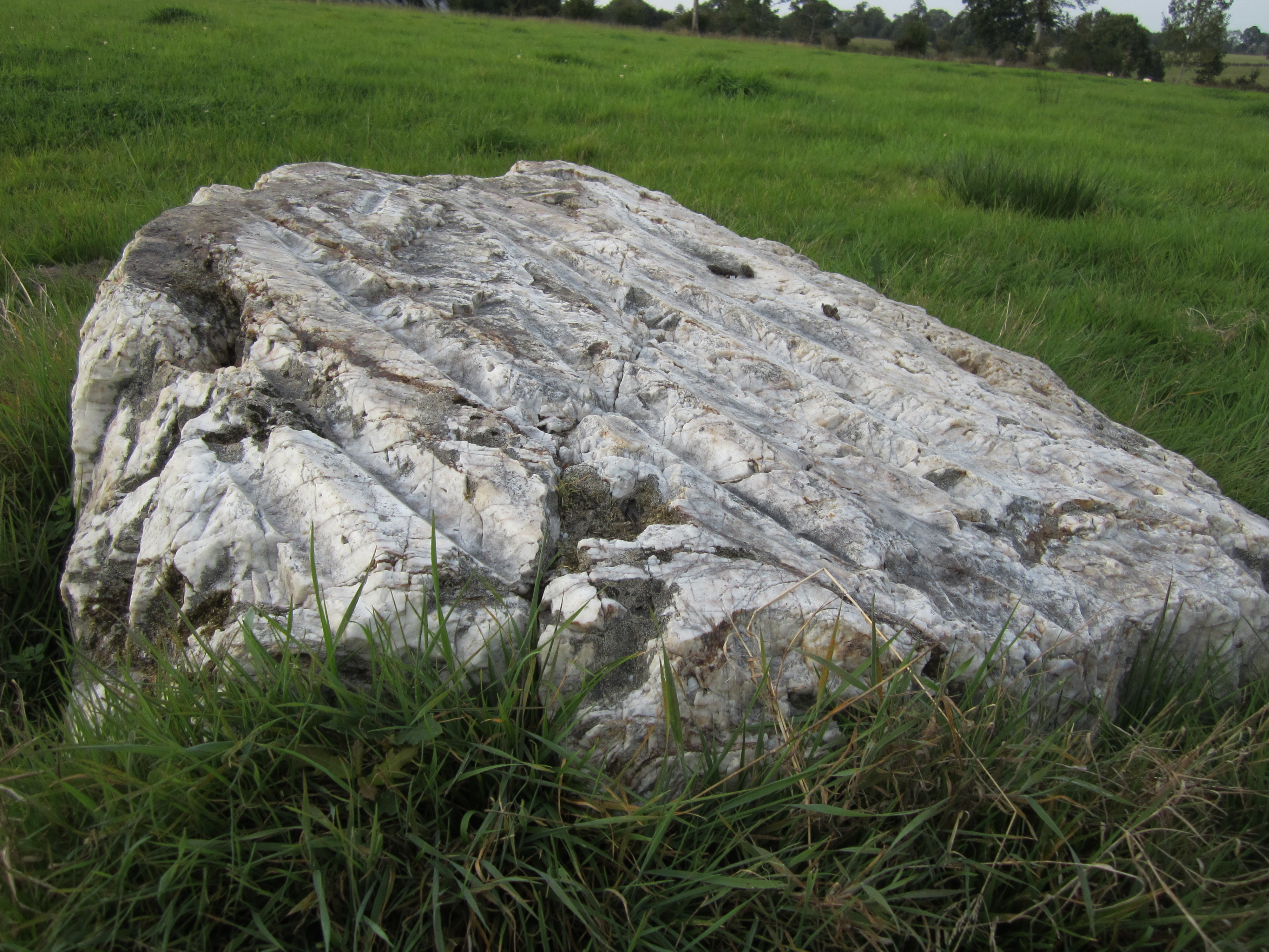 Pierre Saint-Martin est un polissoir en quartzite situé au lieu-dit la Gévraisière .